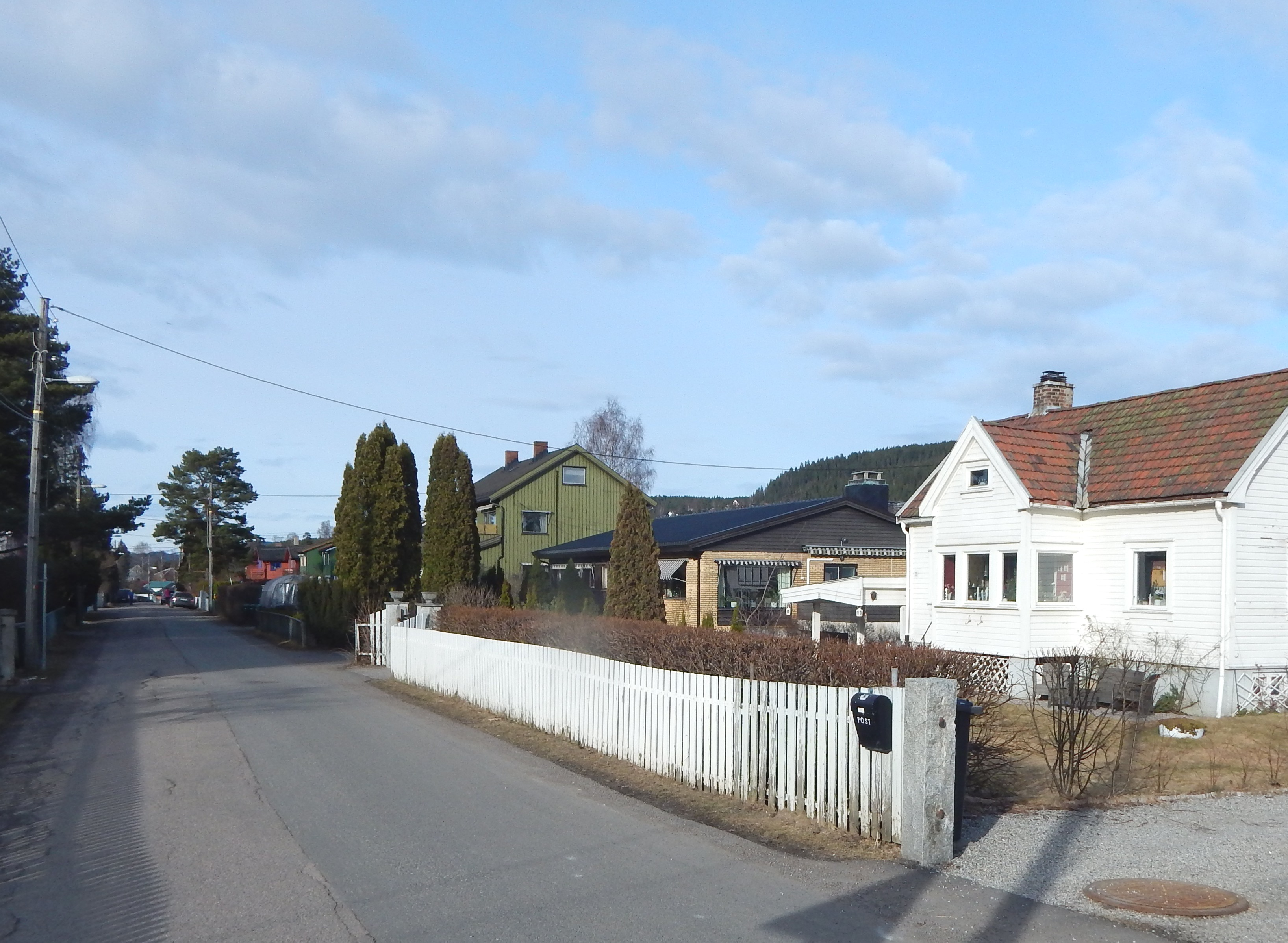 Gamle Kjelsåsvei